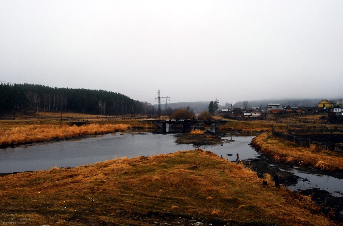 Река Миасс в посёлке Северные Печи